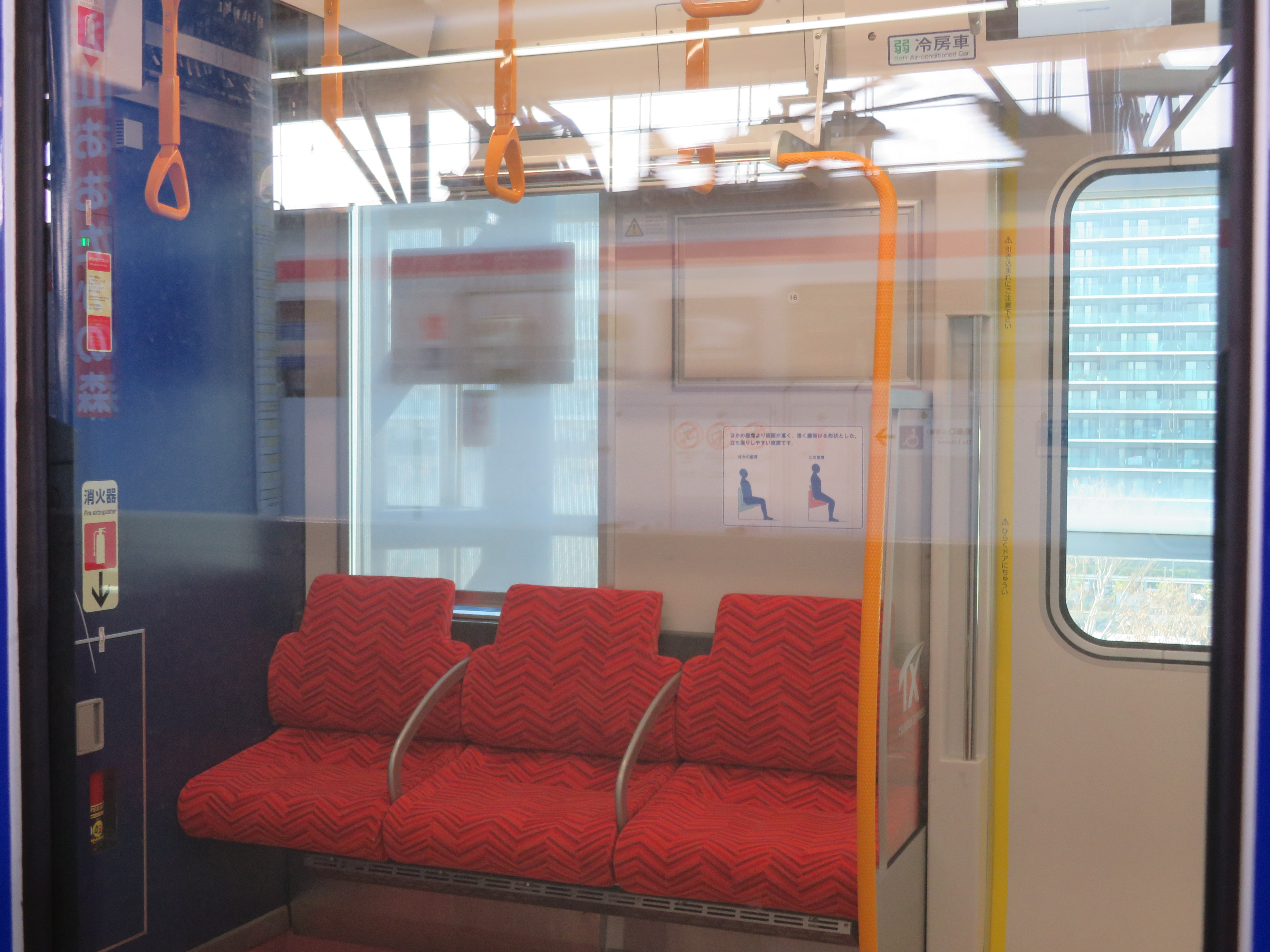 TX-3000系の優先席。 この編成はこの形の優先席だが、一般的な形の編成もある。